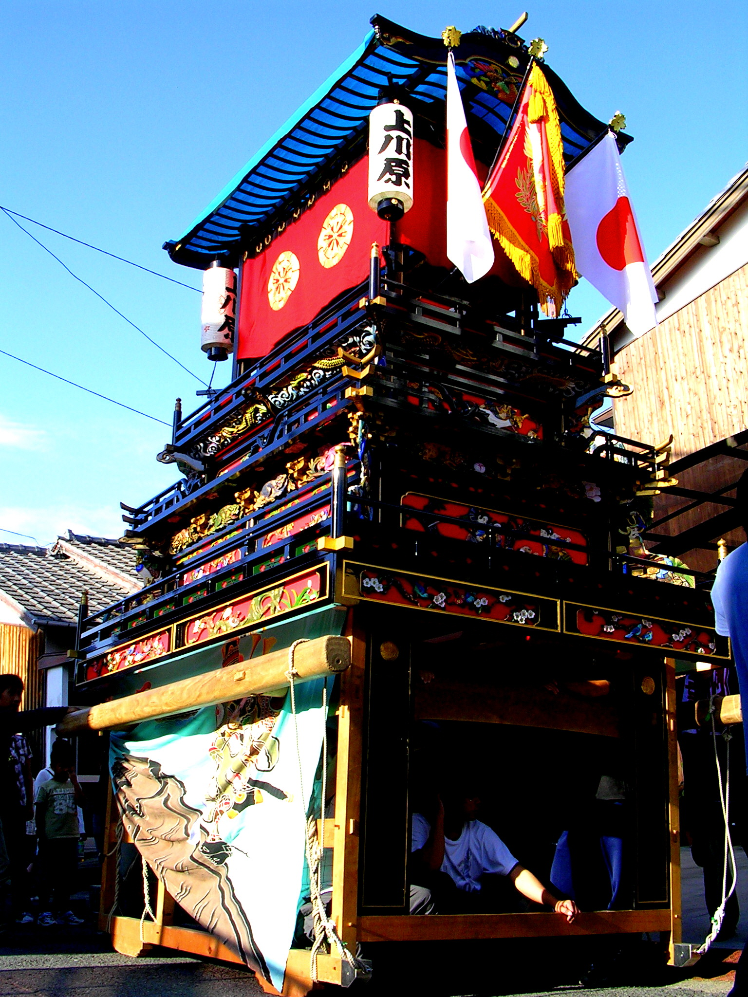 愛媛県 西条市 の祭礼「西条祭り」の塗りだんじり。 通常は年数が経った古い白木屋台を塗るが、現在では必ずしもそうでない傾向にある。 従来の顔料塗りに加えて、近年では奮発して高価な本漆などで塗る屋台も増え、 また有名な塗り師に塗りを依頼するなど 屋台の塗りは年々豪華で派手なものになりつつある。 塗りにすると基本的に屋台の重量がいくぶん重くなるので 塗りを極力嫌う町内もある。 塗りの色は黒塗りが一般的であるが、稀に朱塗りの屋台も存在する。 朱塗りとする屋台が少数であることについては意味があったとして諸説存在するようであるが 朱塗りについての特別な意味を証明する文献や伝承はほぼ現存しておらず、 そのため現在では 塗りを黒塗りまたは朱塗りにするかどうかはそれぞれの町内の判断で決定されている。